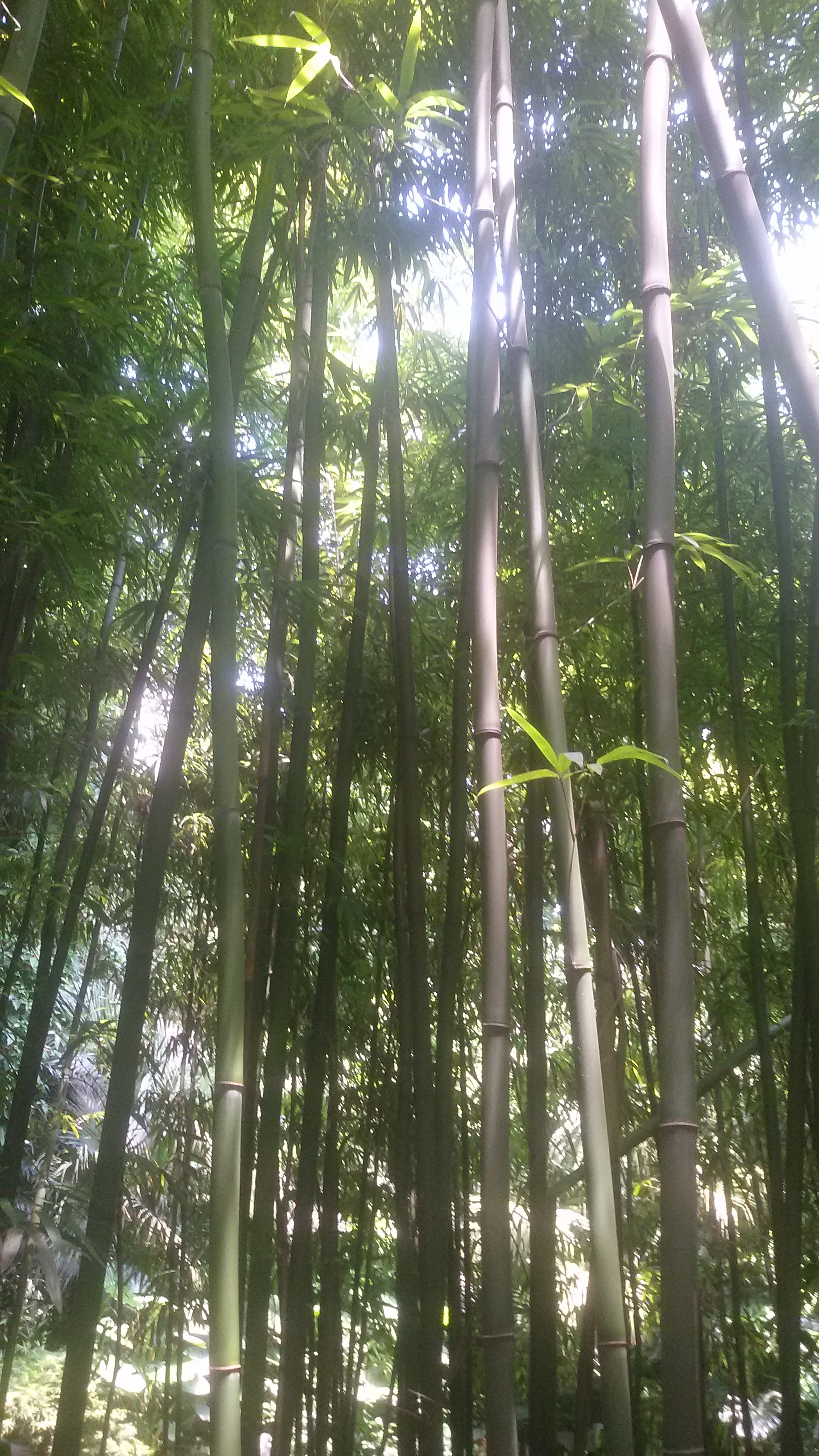 粵語: 喺广州兰圃种嘅青皮竹